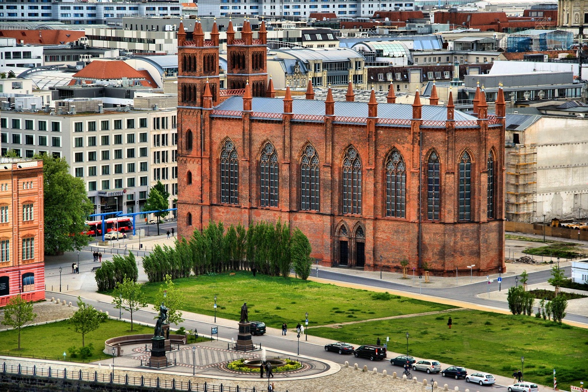 Friedrichswerdersche Kirche & Schinkelplatz vom Berliner Dom (Kuppel) aus gesehenThis is a photograph of an architectural monument.